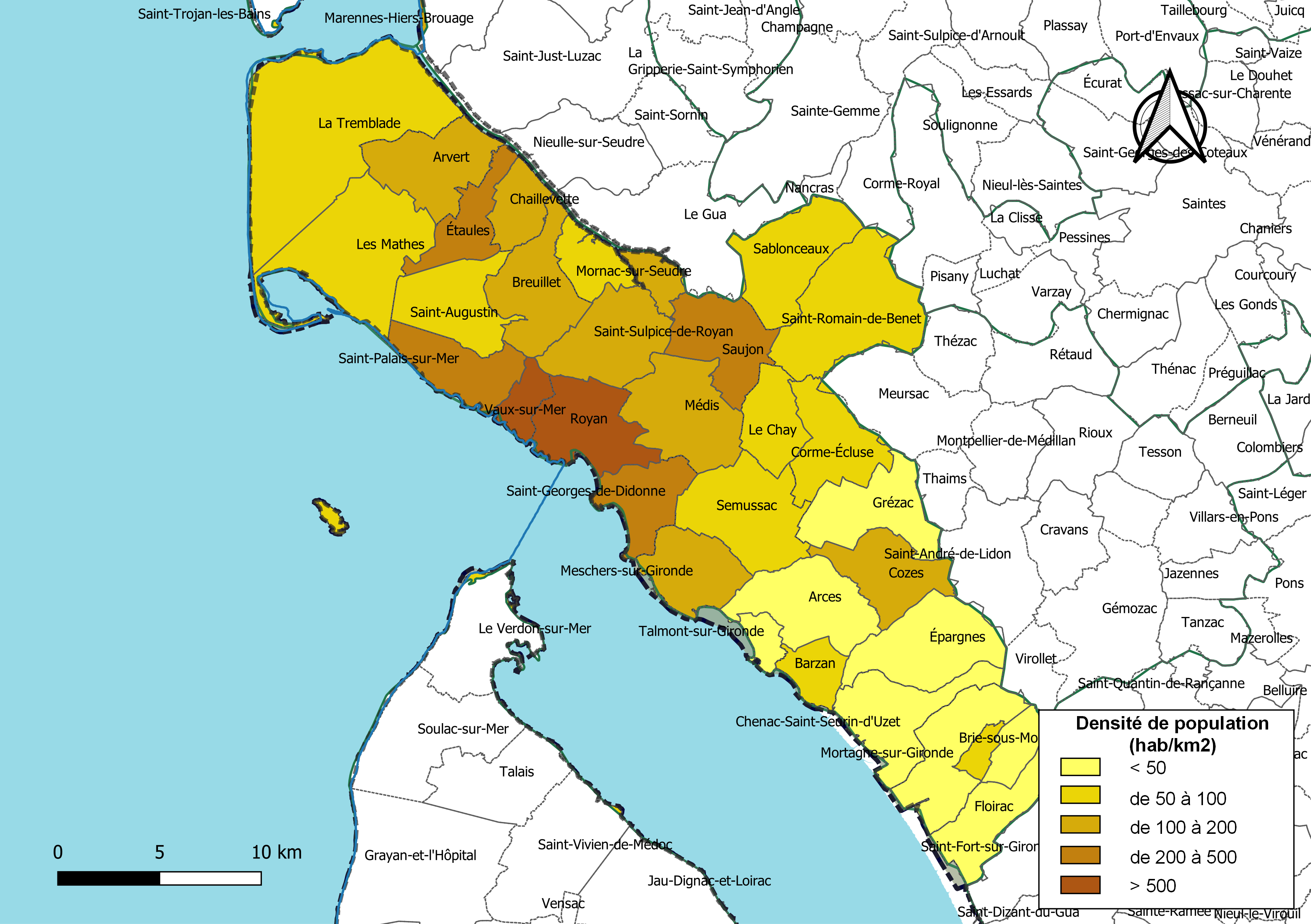 Carte des densités de population (millésimée 2016) des communes de la communauté de communes la Communauté d'agglomération Royan Atlantique, département de la Charente-Maritime, France. Composition au 1er janvier 2019.